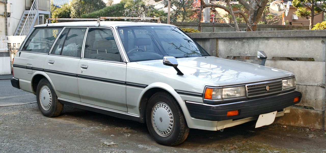 Toyota Mark II Van 1.8 GL ( YX78V )